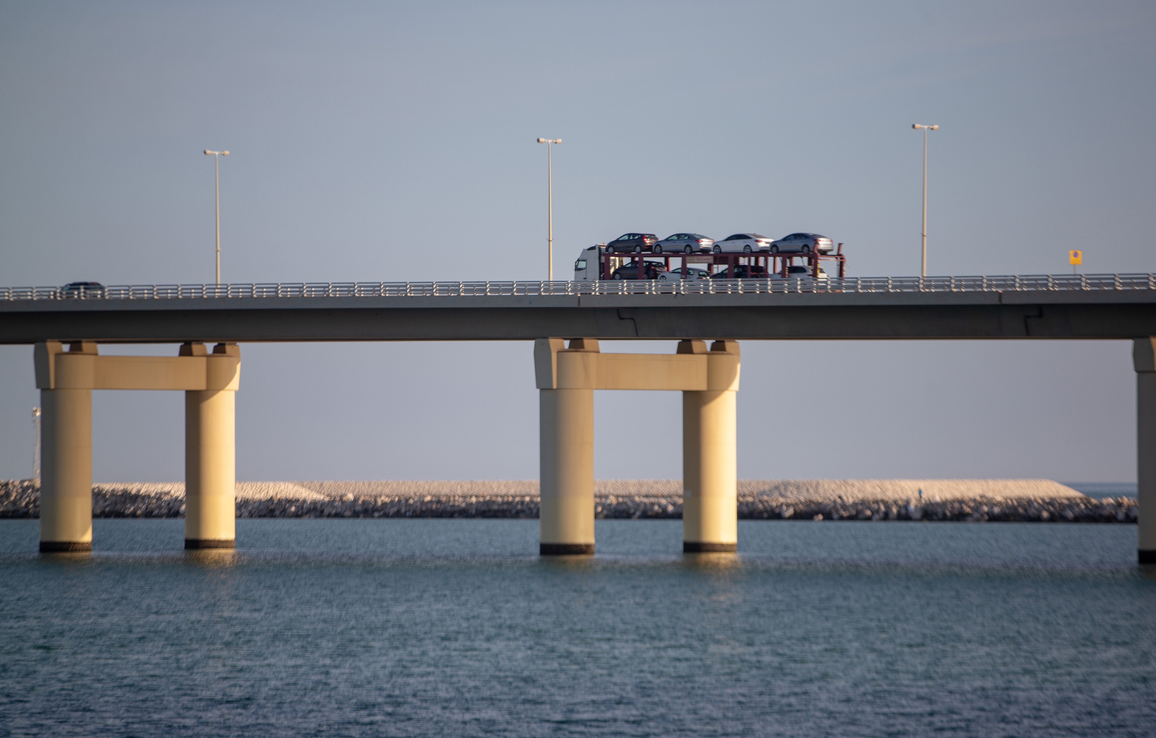 جسر الملك فهد يربط شرق المملكة بدولة البحرين